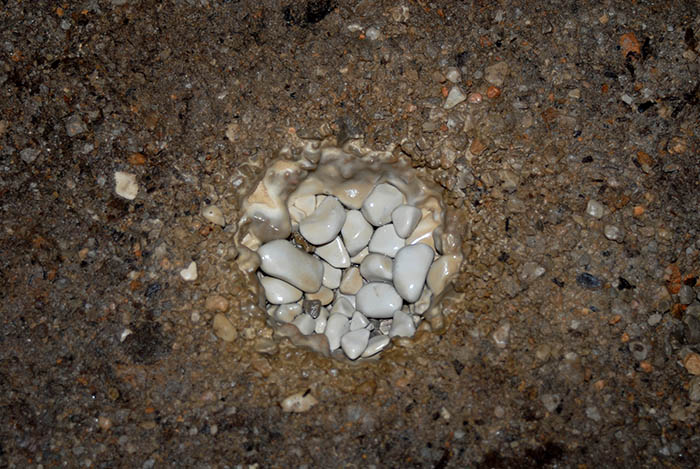 foto: Boštjan Burger (proces nastajanja jamskih biserov)